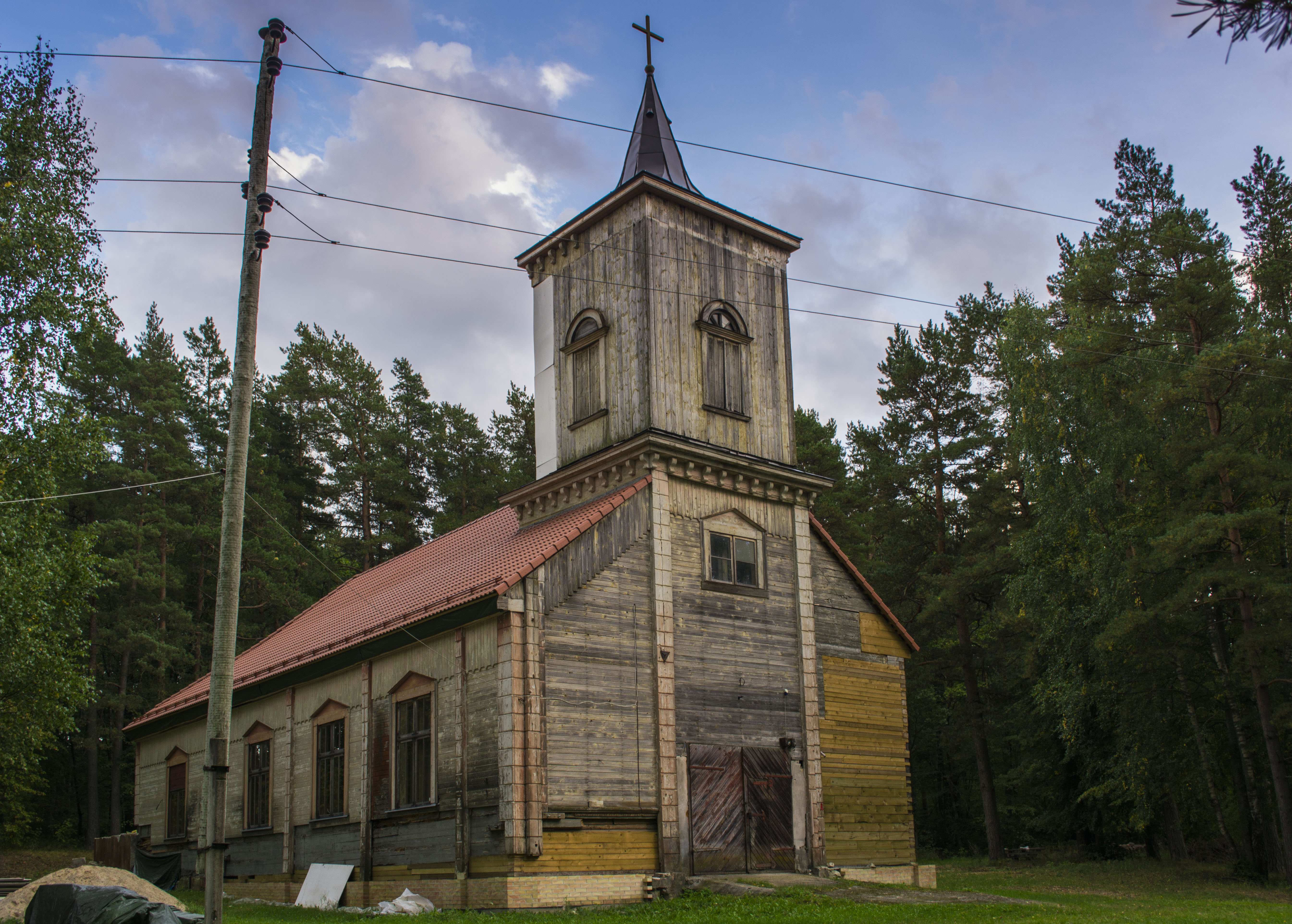 Carnikavas luterāņu baznīca, Siguļi